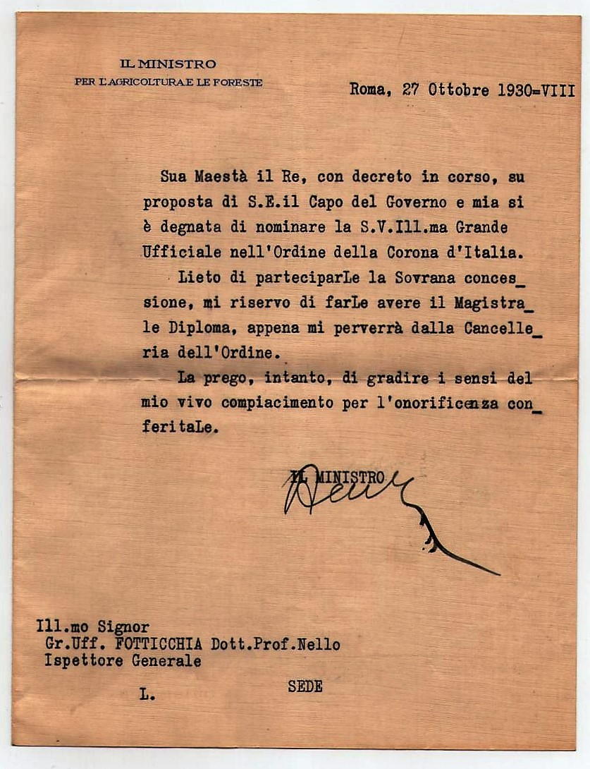 27.10.1930, conferimento della nomina di grande Ufficiale della Corona d'Italia a Nello Fotticchia